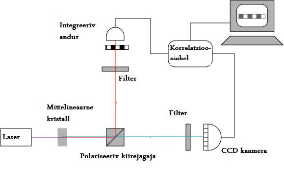 Kummituskuva_1